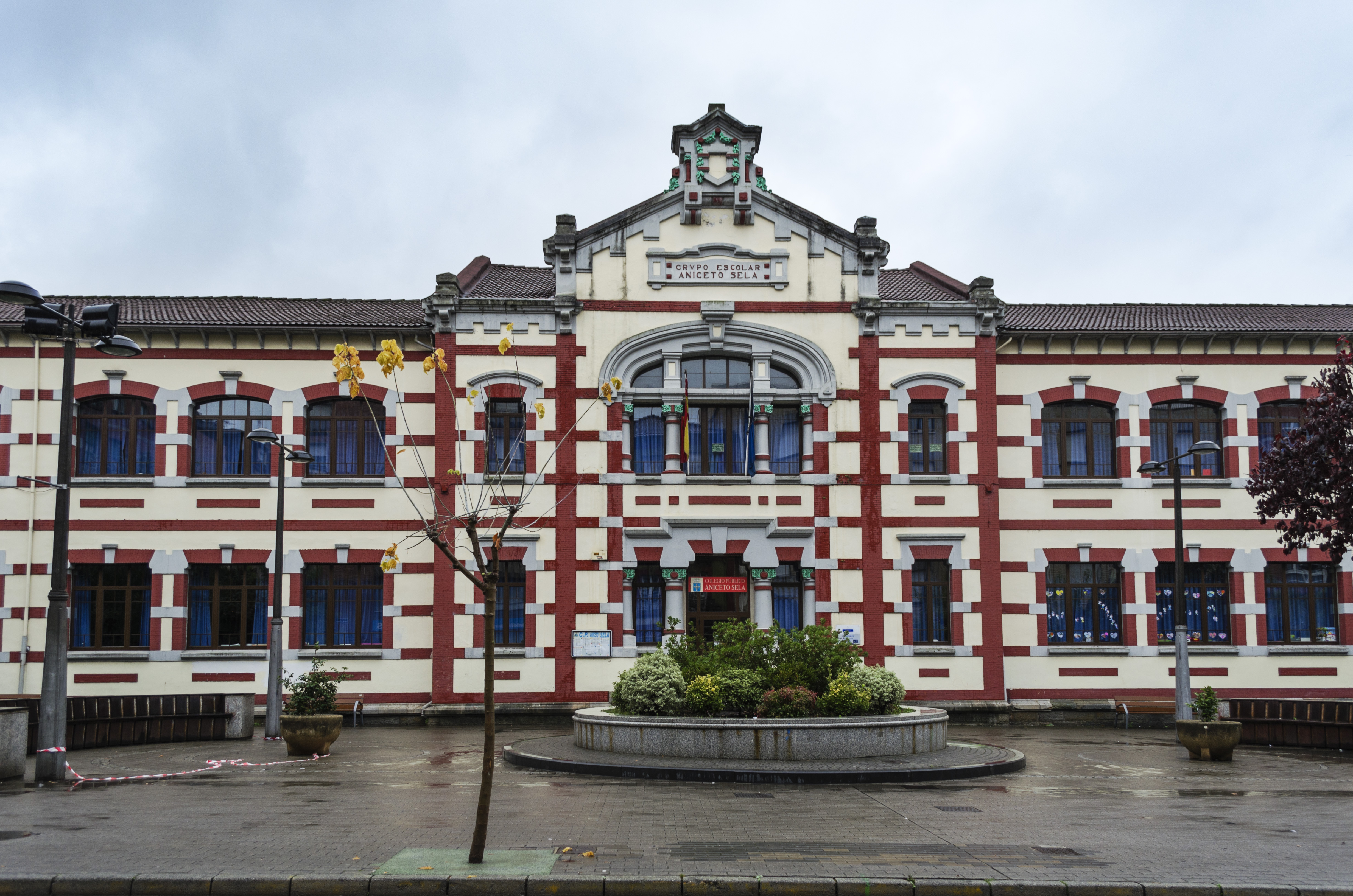 Colegio Aniceto Sela, Colegio Liceo Mierense, Mieres